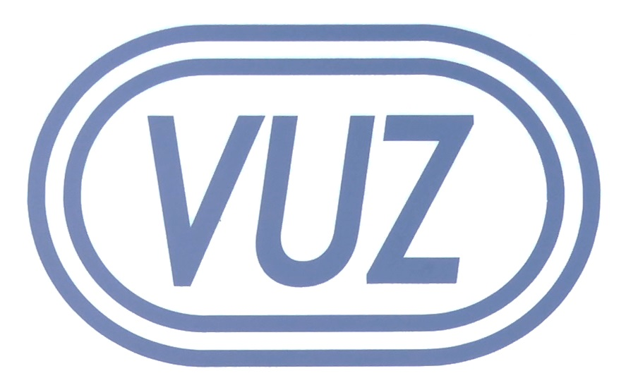 Logo des Výzkumný Ústav Železniční (VUZ, Forschungsinstitut der Eisenbahn) in Tschechien